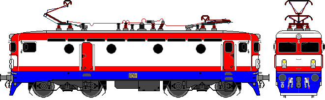 Zeljeznice Federacije BiH 441 series livery